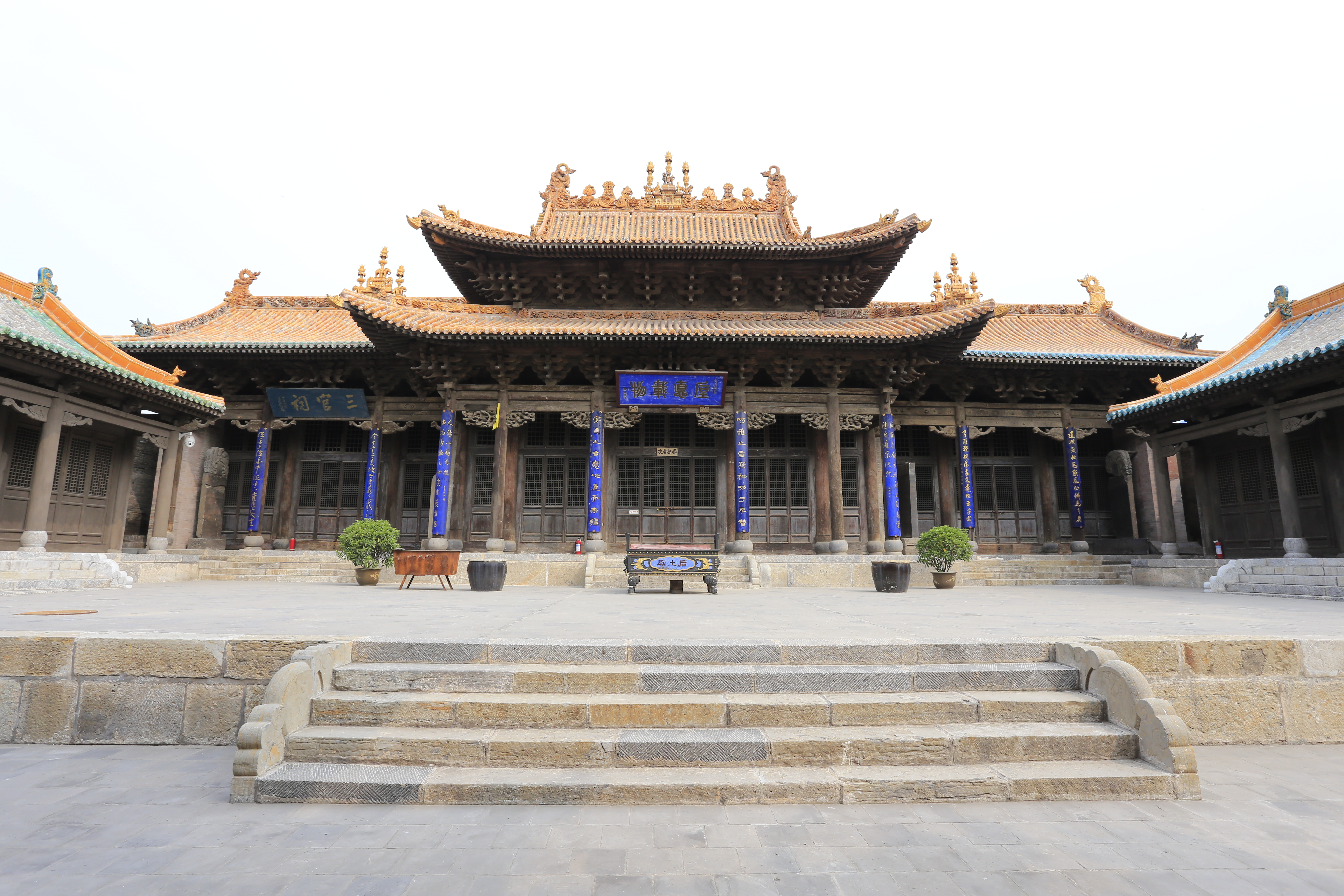 介休后土庙